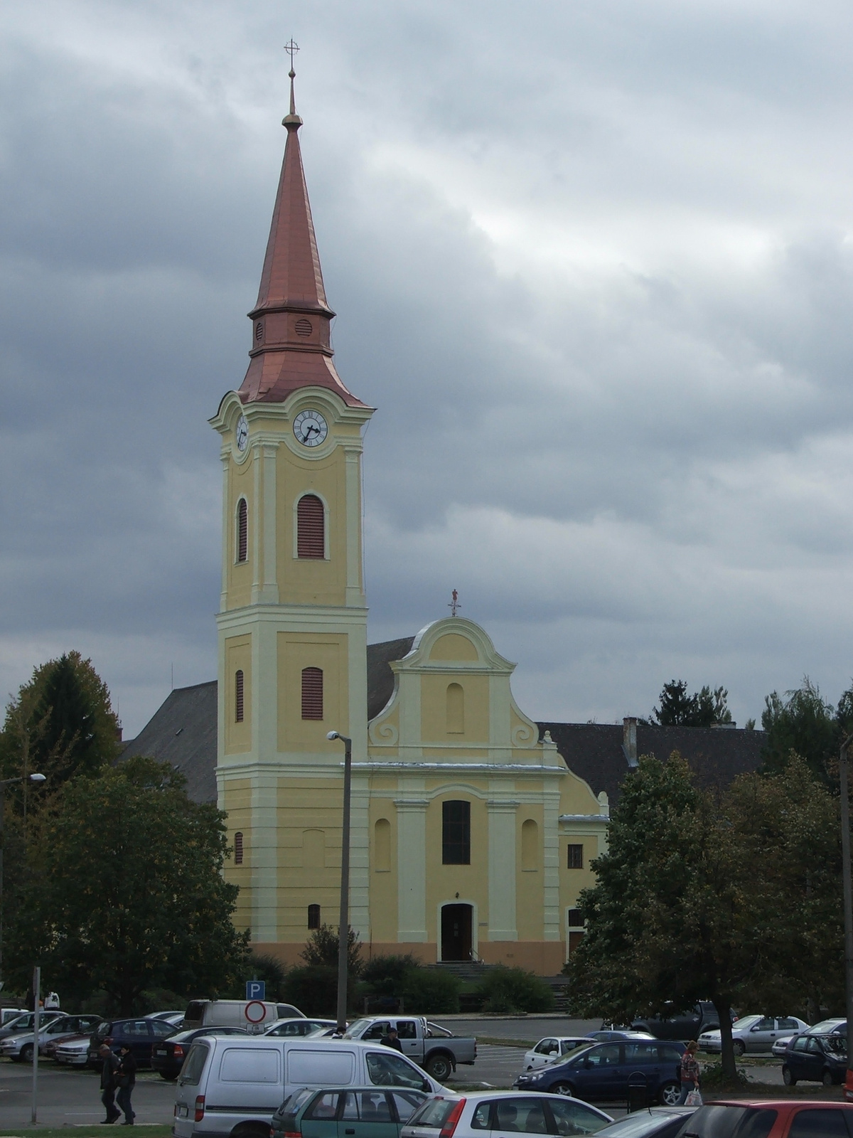 Alsóvárosi ferences templom (Nagykanizsa, Zárda u.)